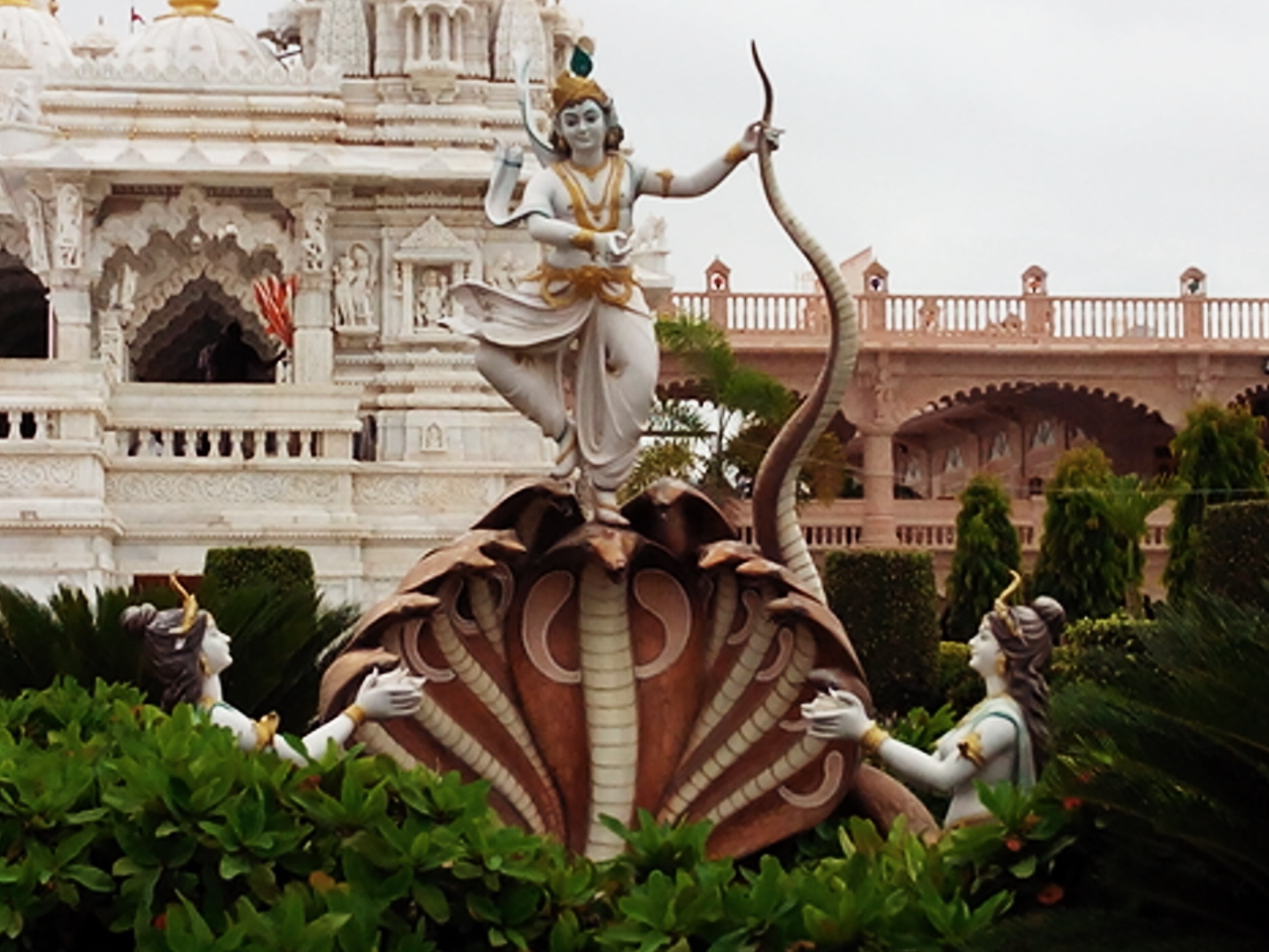 Statue depicting Kaliya daman incident from life of Hindu god, Krishna. Taken at Swaminarayan Temple, Bhuj, Kutch, Gujarat, India.